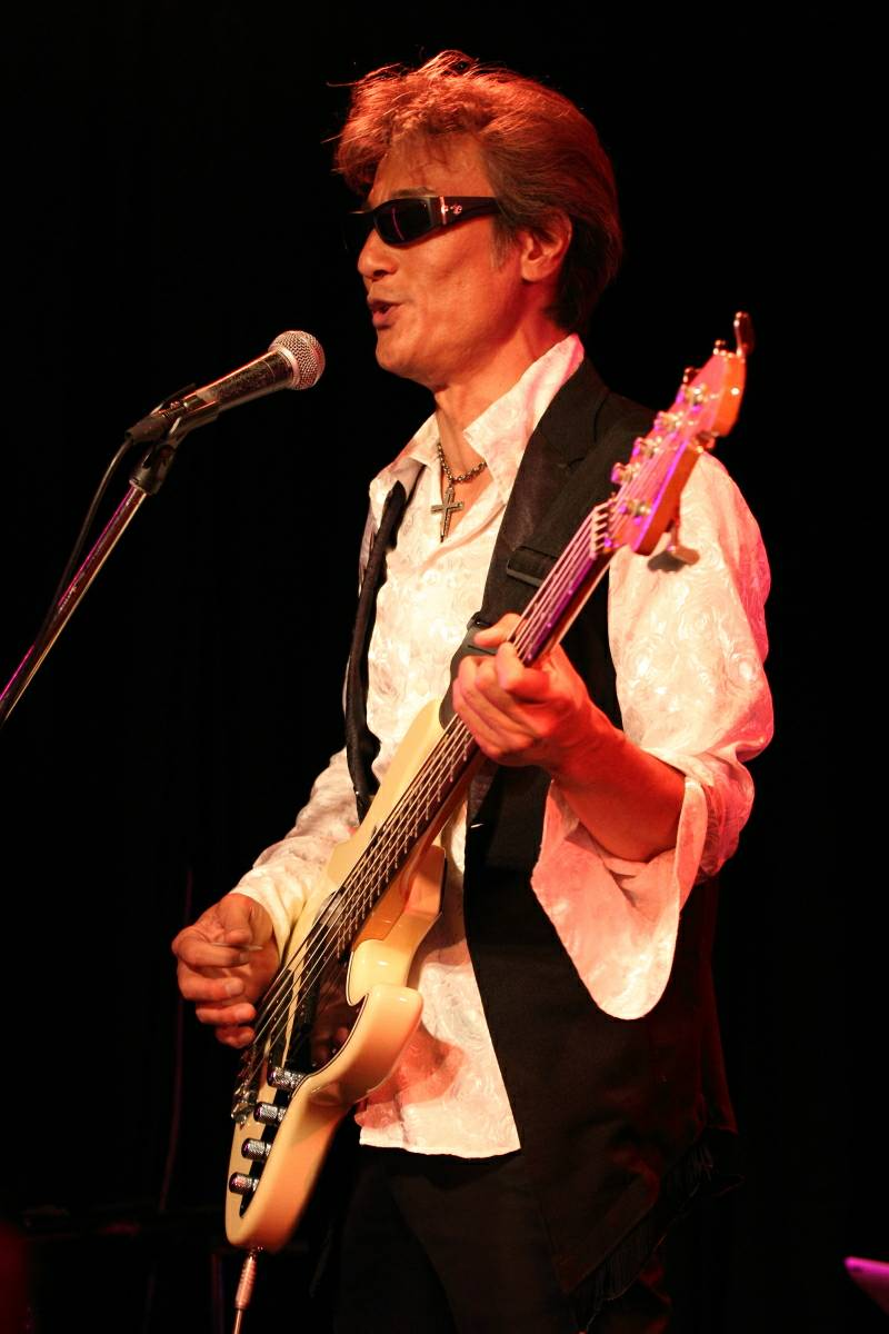 葛城哲哉「double dealer 25th」（池袋Ｋ3）